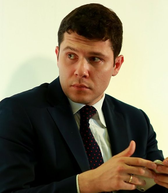 Антон Андреевич Алиханов (род. 1986) — российский государственный деятель